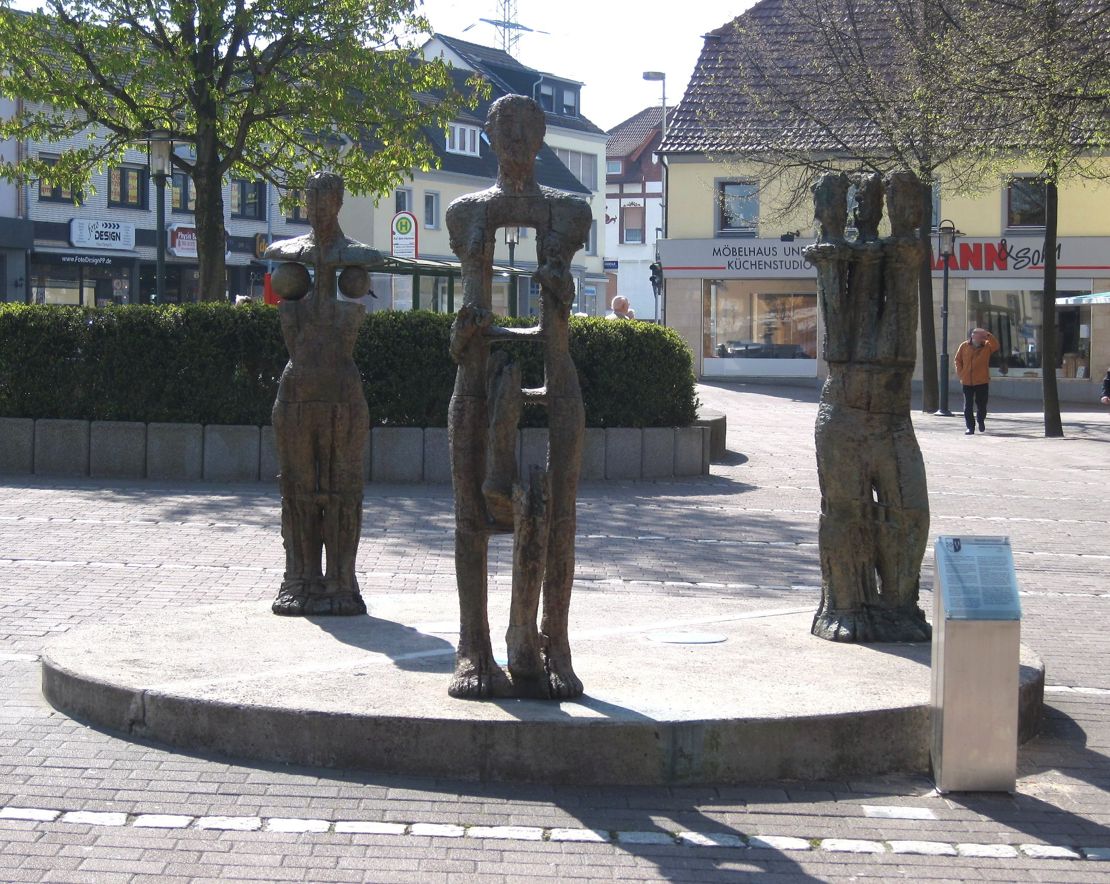 Skulptur „Bundesdeutsche Trilogie zu Einigkeit und Recht und Freiheit“ in Hemer. Erschaffen 1999 durch den Künstler Eberhard Linke.